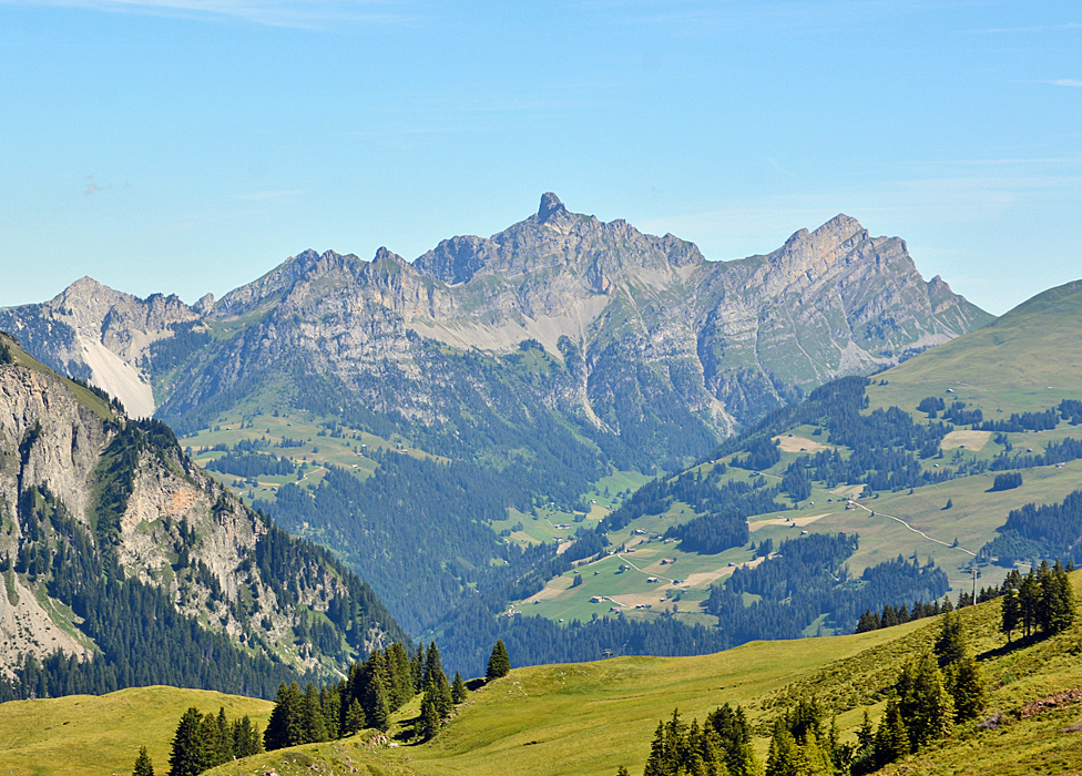 Die Spillgerte im Simmental, Bern